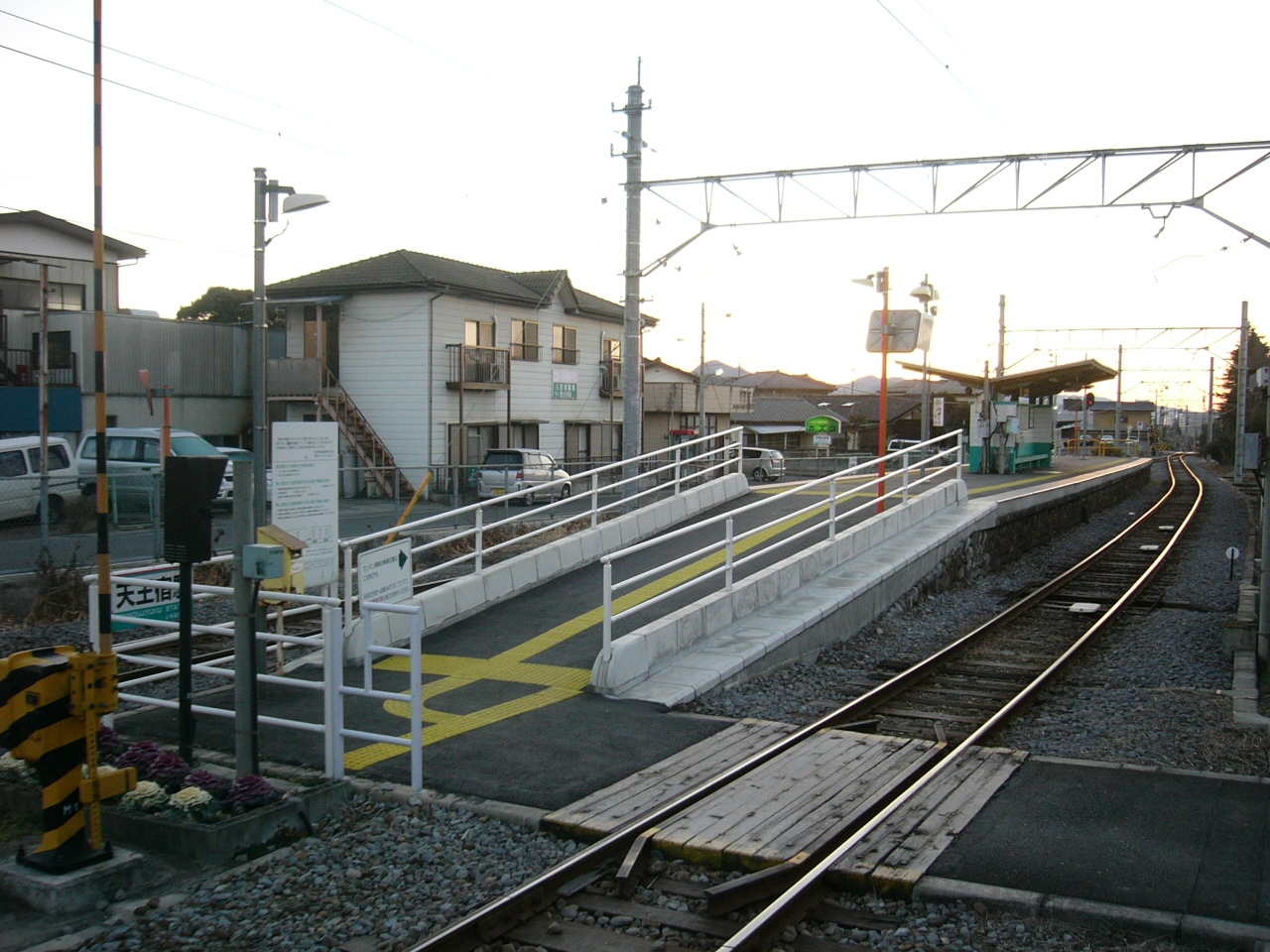 Tennojuku Station